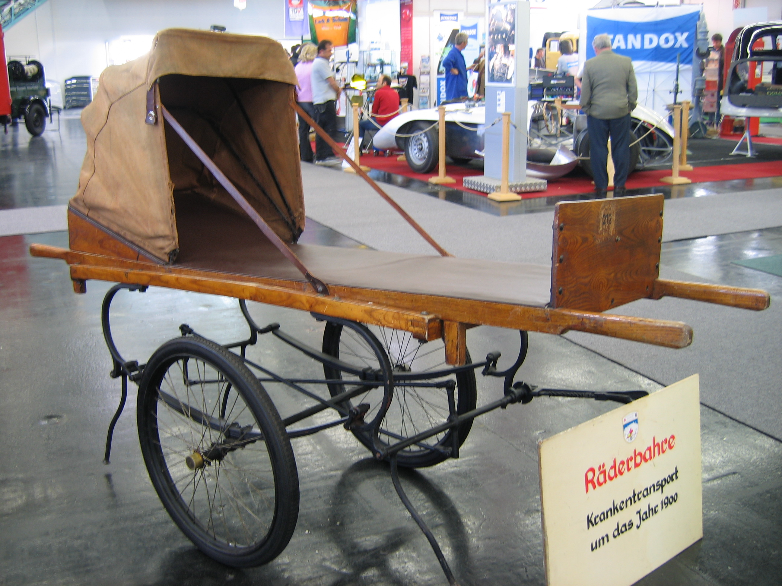 Räderbahre, Krankentransport um das Jahr 1900 / Patient Transport around 1900